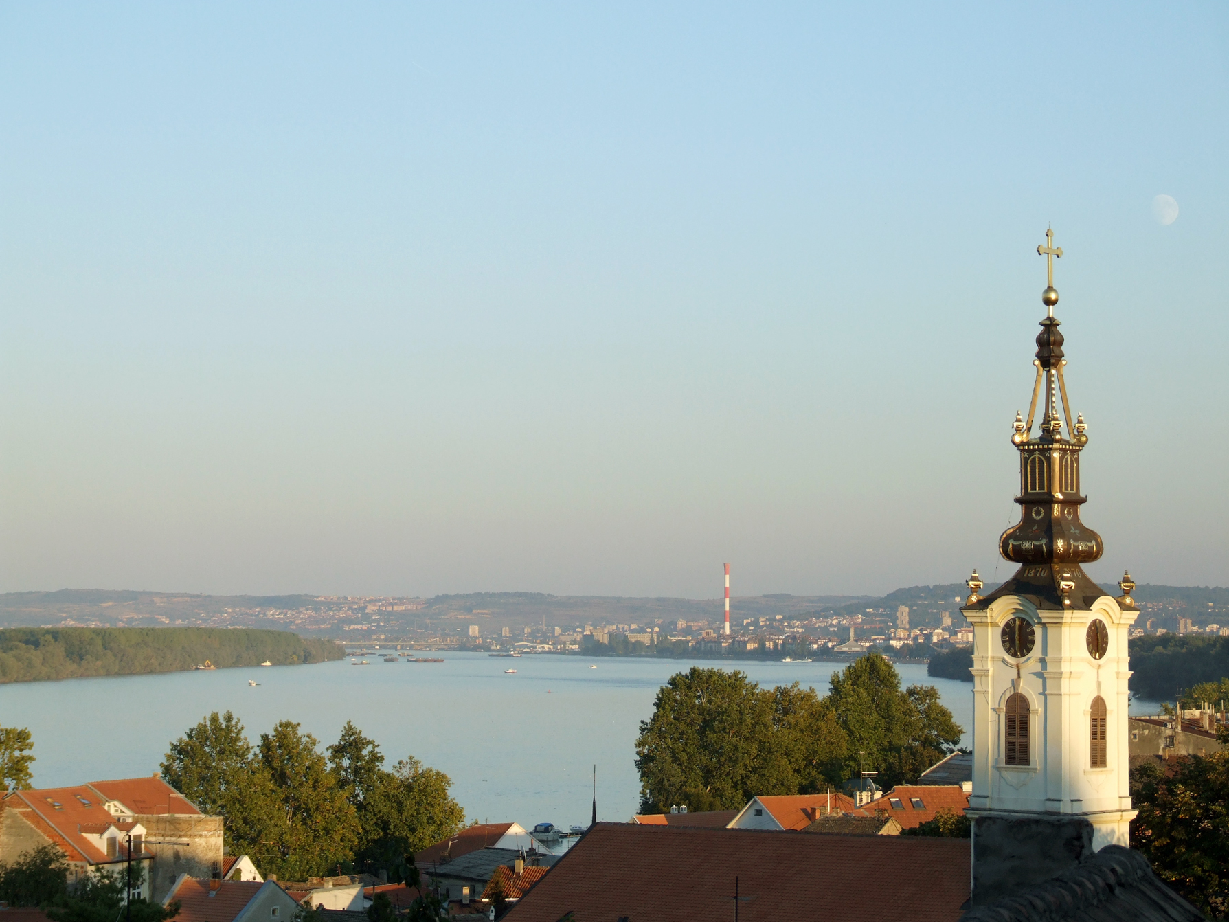 Земун, поглед са Гардоша на Дунав и Београд